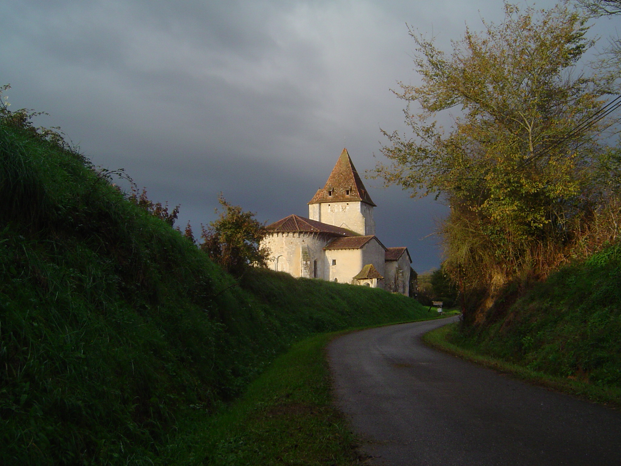 Glèisa d'Aulèrs ; Doasit ; Gasconha